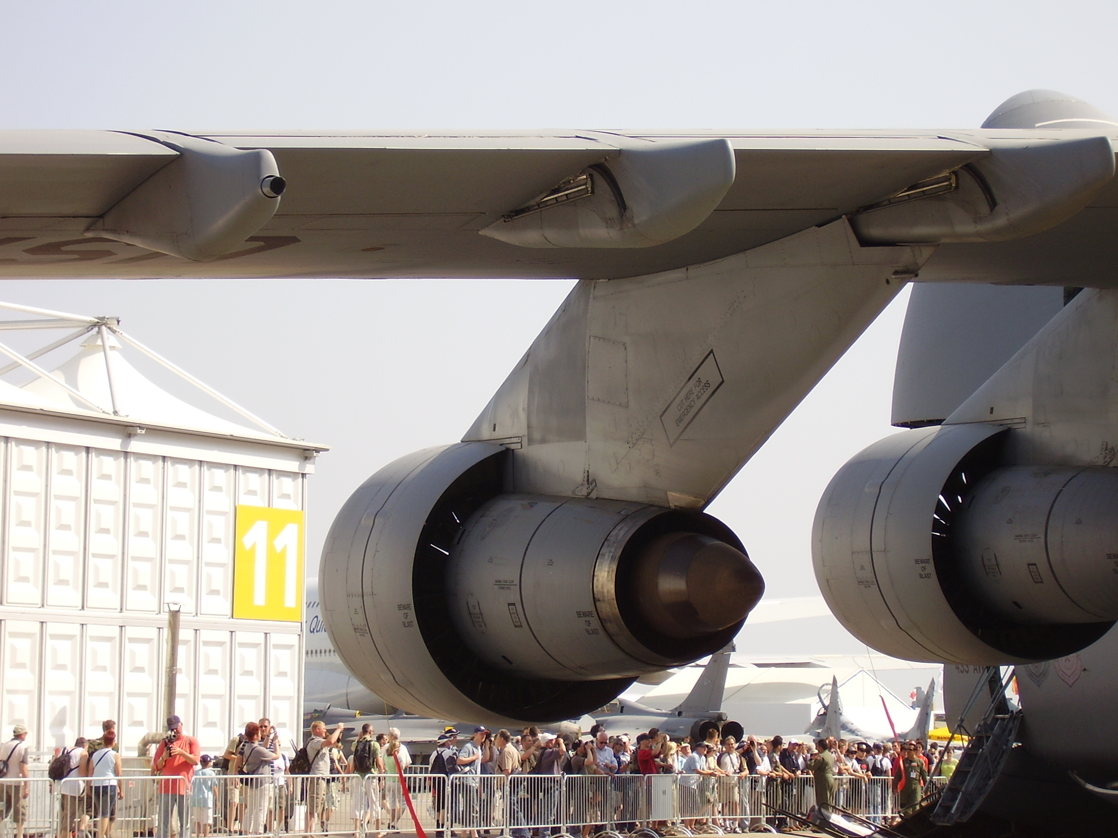 ILA 2008